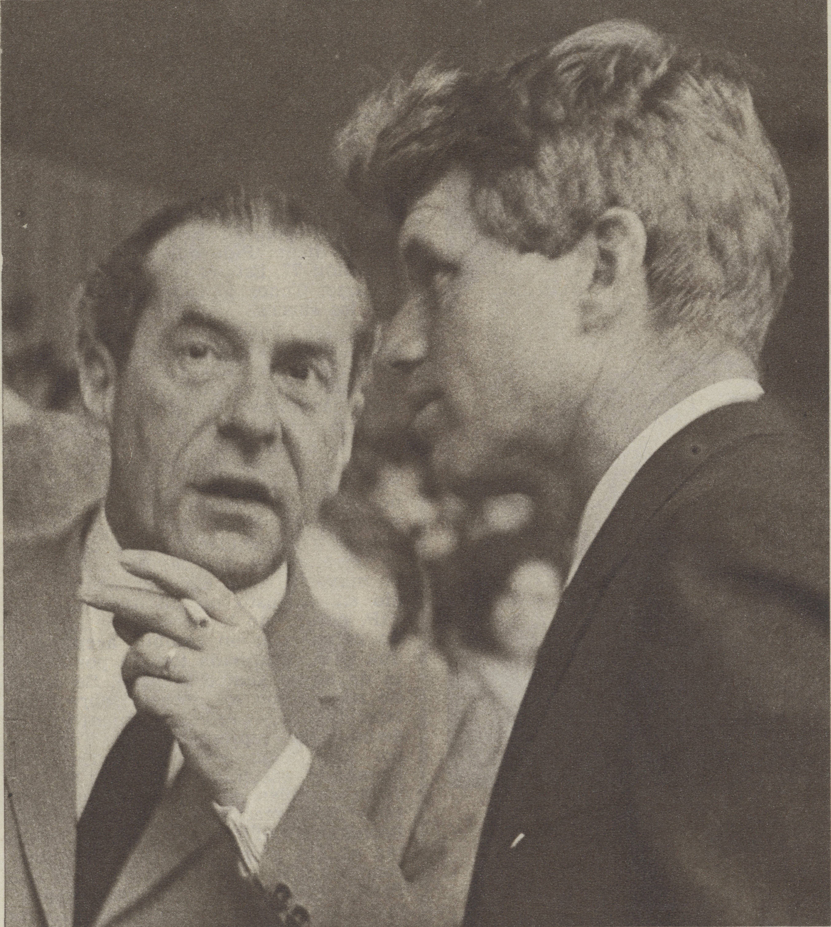 Gabriel Valdés fue ministro de Relaciones Exteriores, presidente del Senado y reconocido líder dentro de la DC